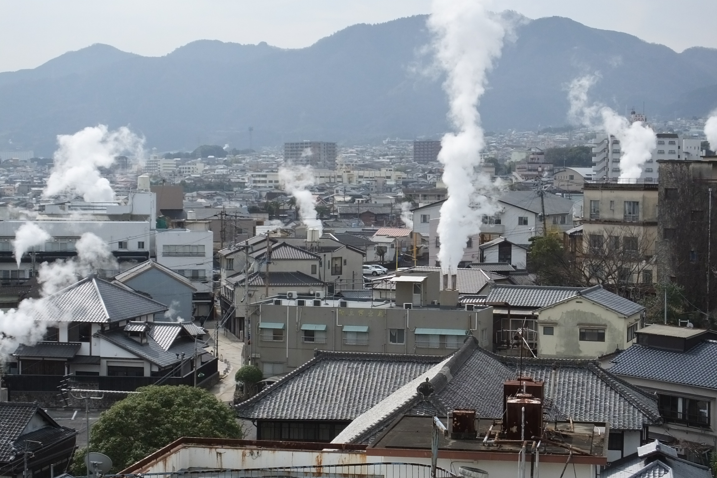 2020-02-24 Kannawa Onsen 鉄輪温泉全景